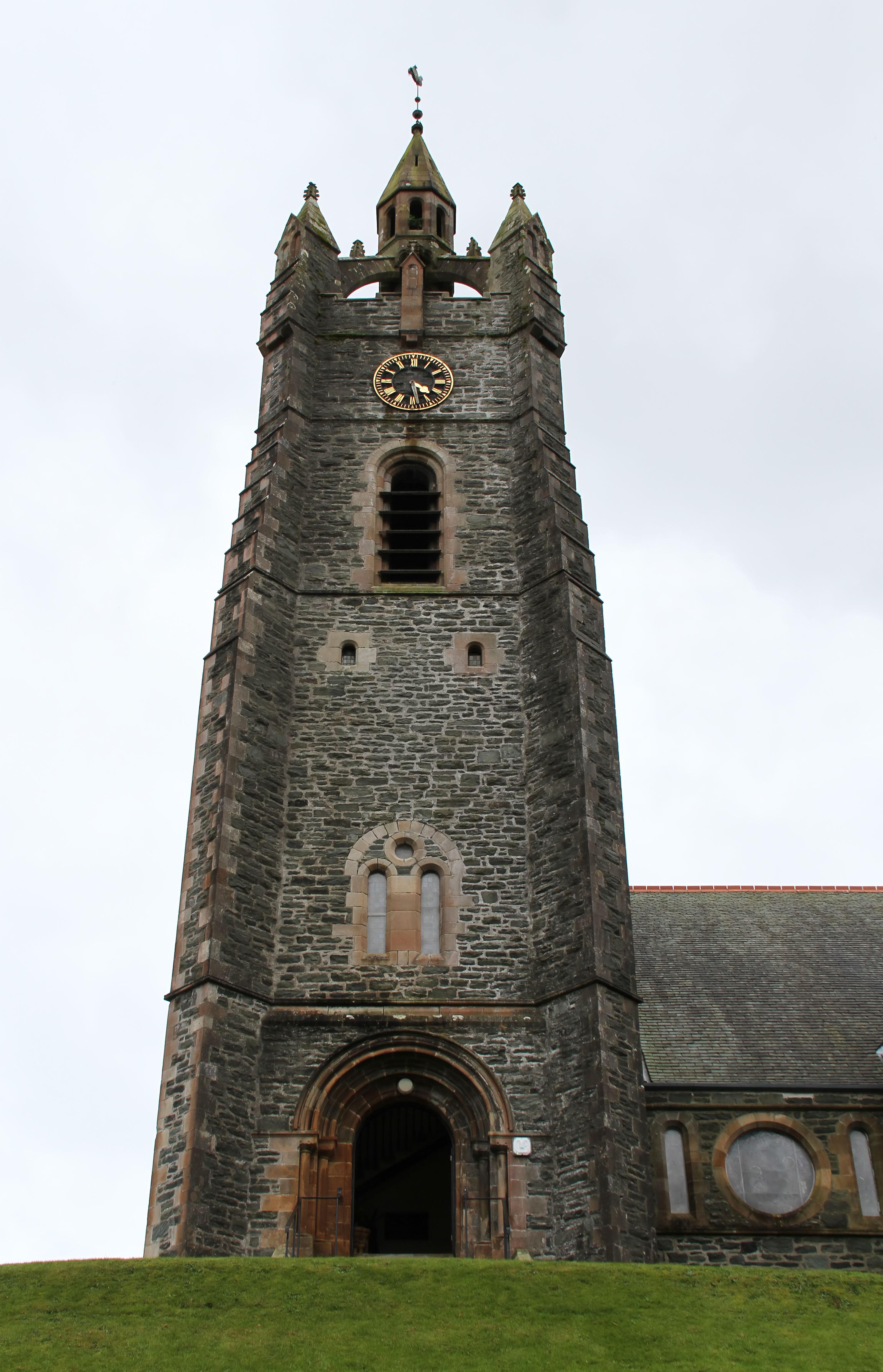 Tarbert 7